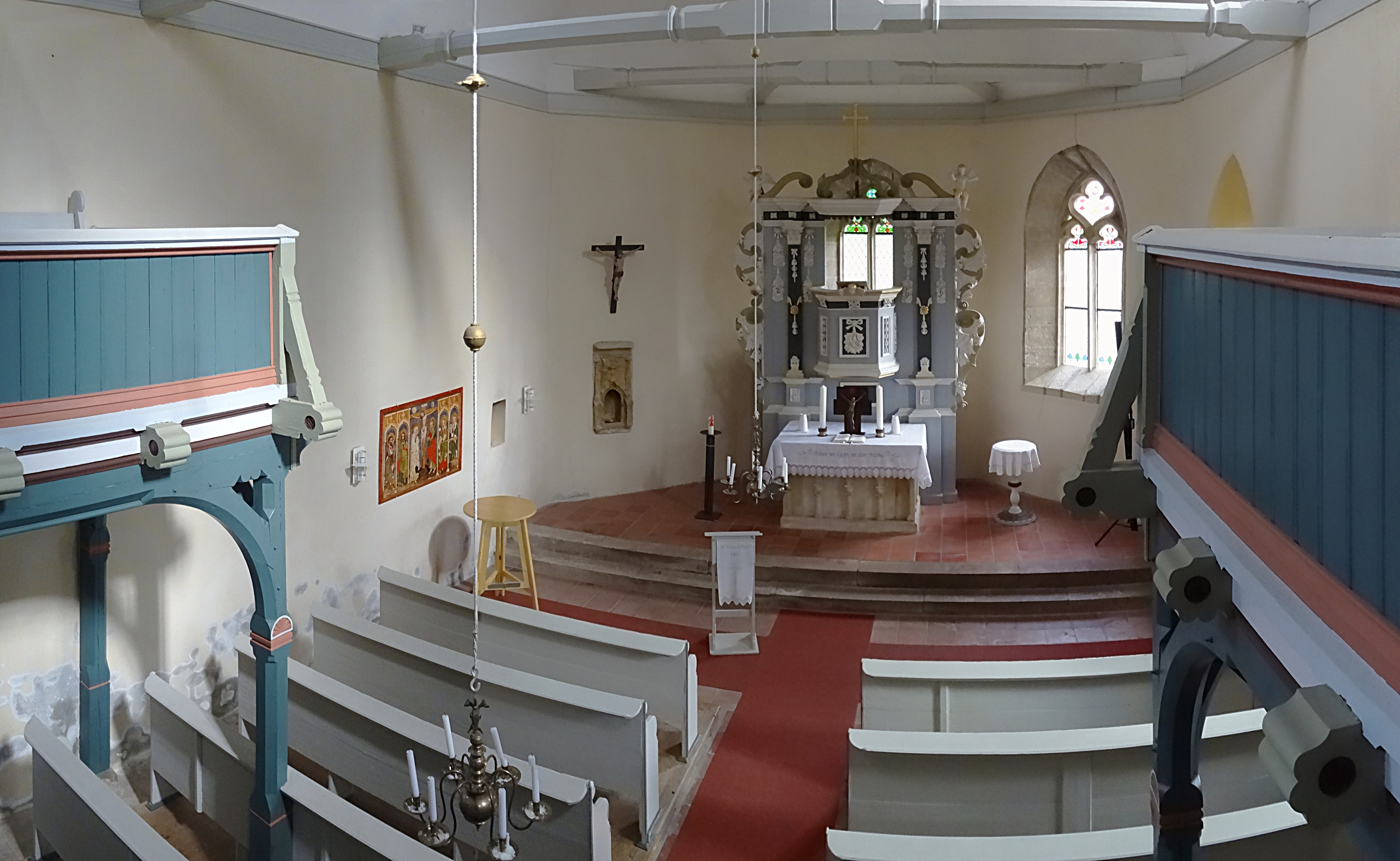 Innenraum-Panorama St. Peter und Paul (Tiefthal)